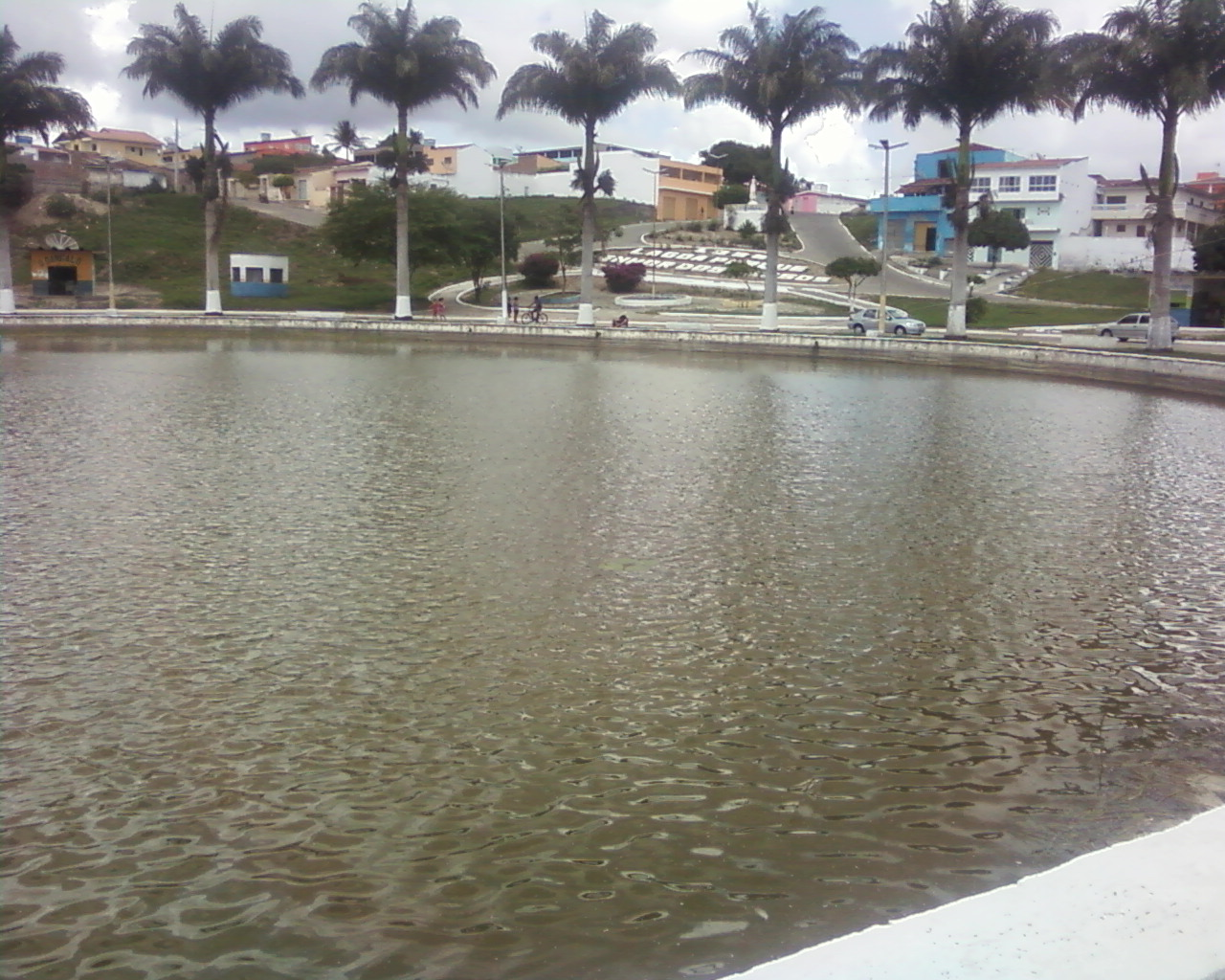 Lagoa no centro da cidade de Remígio, Brasil.